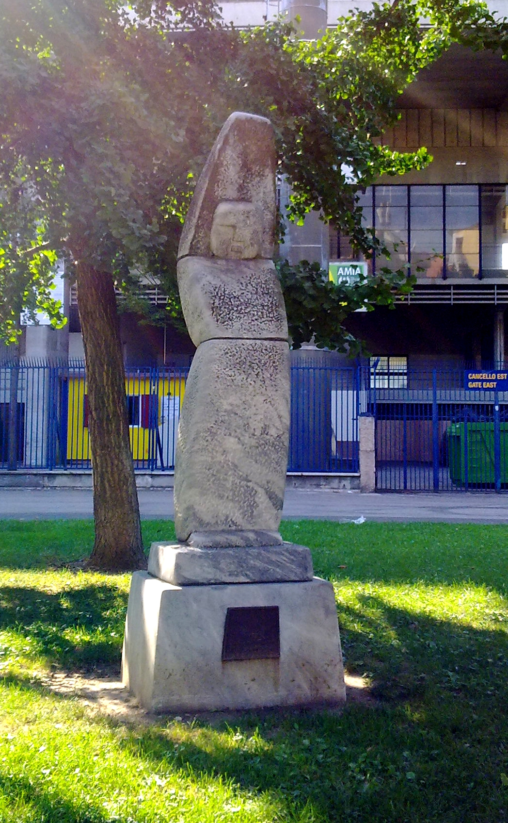 Monumento di fronte allo stadio in Piazzale Olimpia